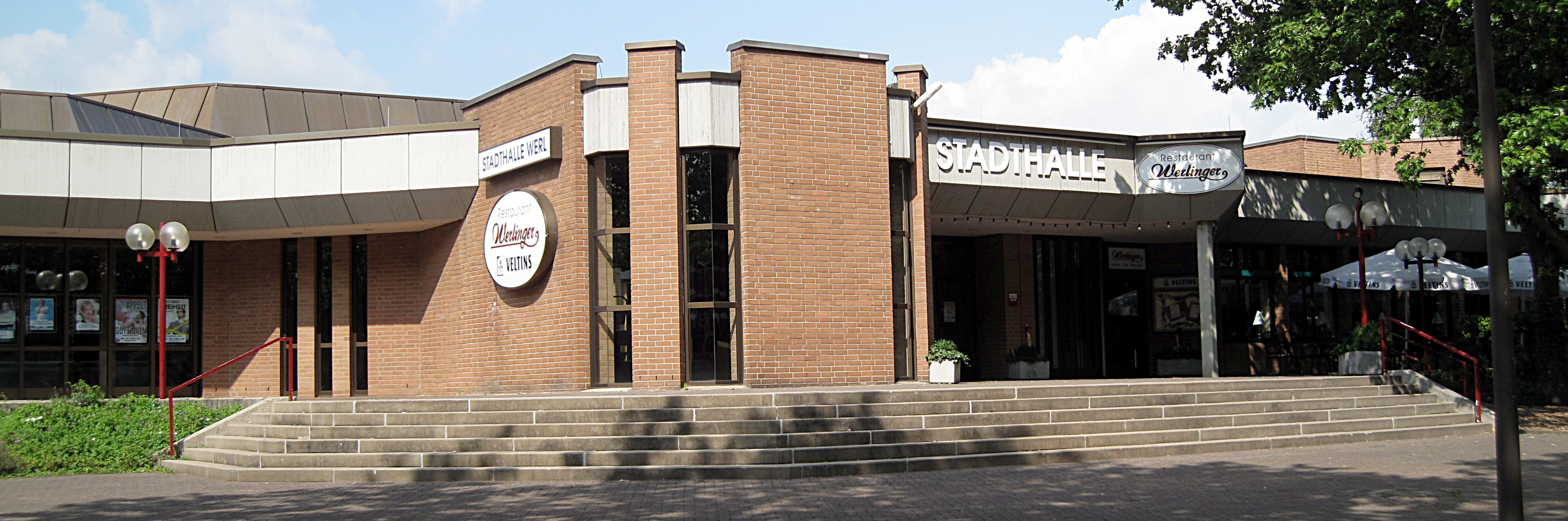 Werl, Stadthalle